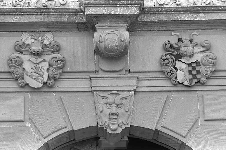 Huvudbyggnadens portal. Slutsten och fris med vapentavlor Motiv: Årby gård Kategori: Herrgård Huvudbyggnadens portal. Slutsten och fris med vapentavlor.